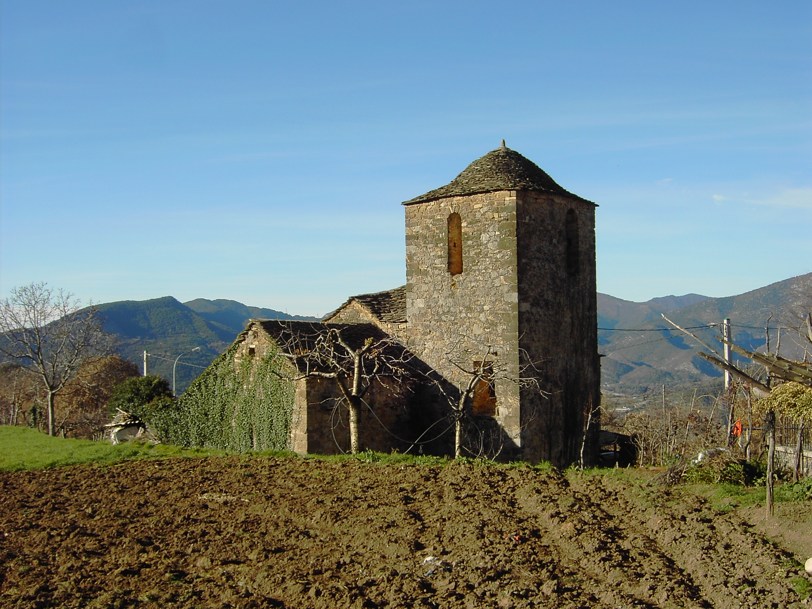 Iglesia de Ceresa, del siglo XVII.